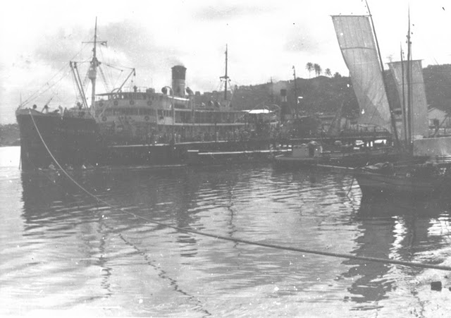 Foto do navio Anibal Benévolo afundado pelo submarino alemão U-507 em 16 de agosto de 1942 no litoral do Estado de Sergipe, Brasil.